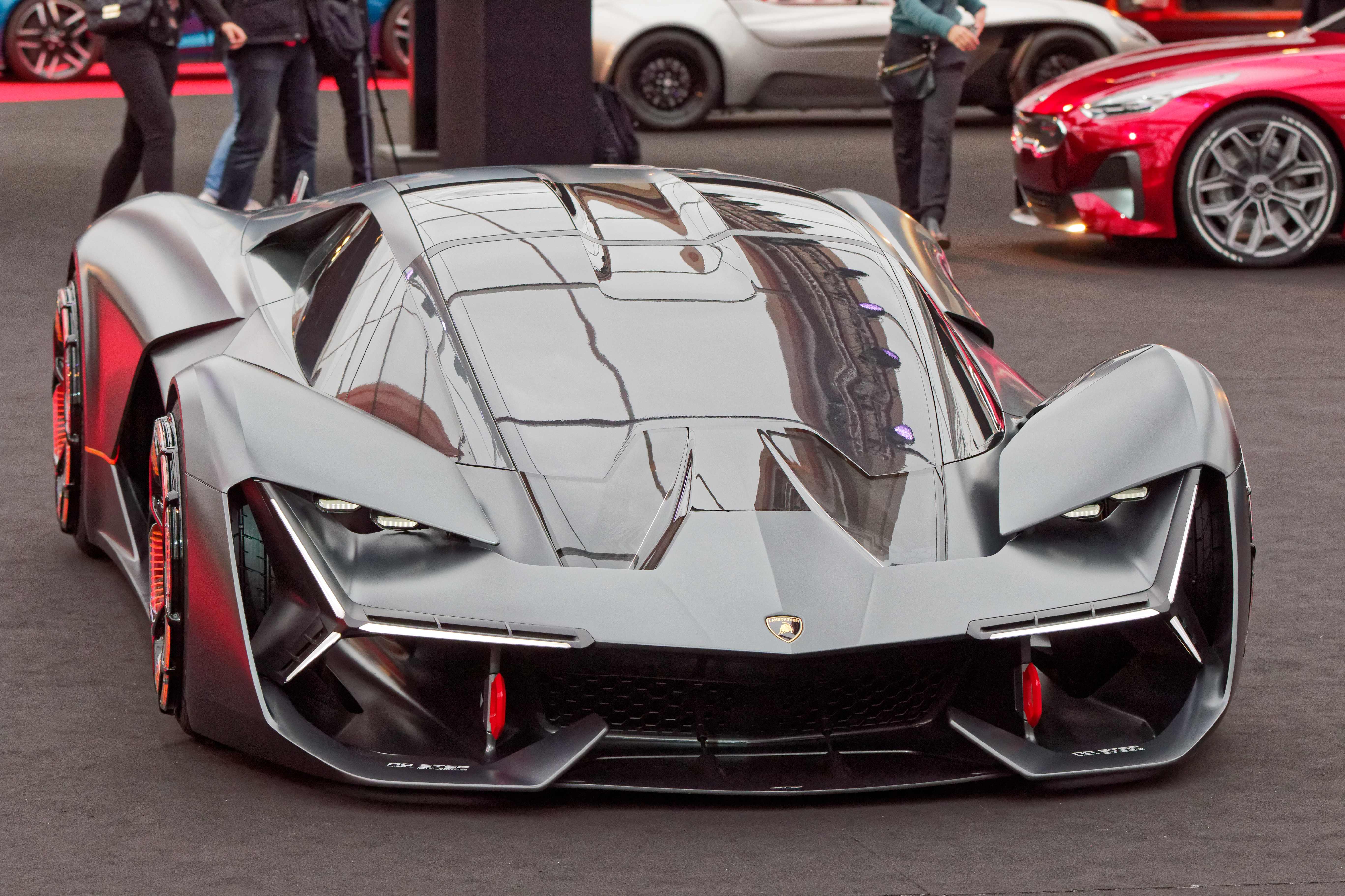 Un véhicule exposé lors du festival automobile international 2018.